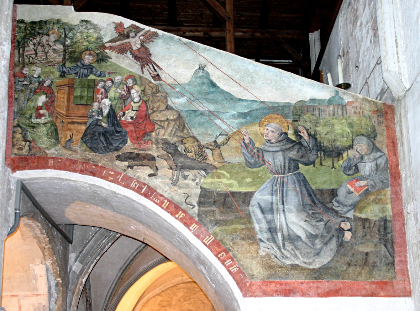 St. Francis receiving the stigmata; die Stigmatisation des Hl. Franz von Assisi, Fresko in St. Katharinen (Lübeck)